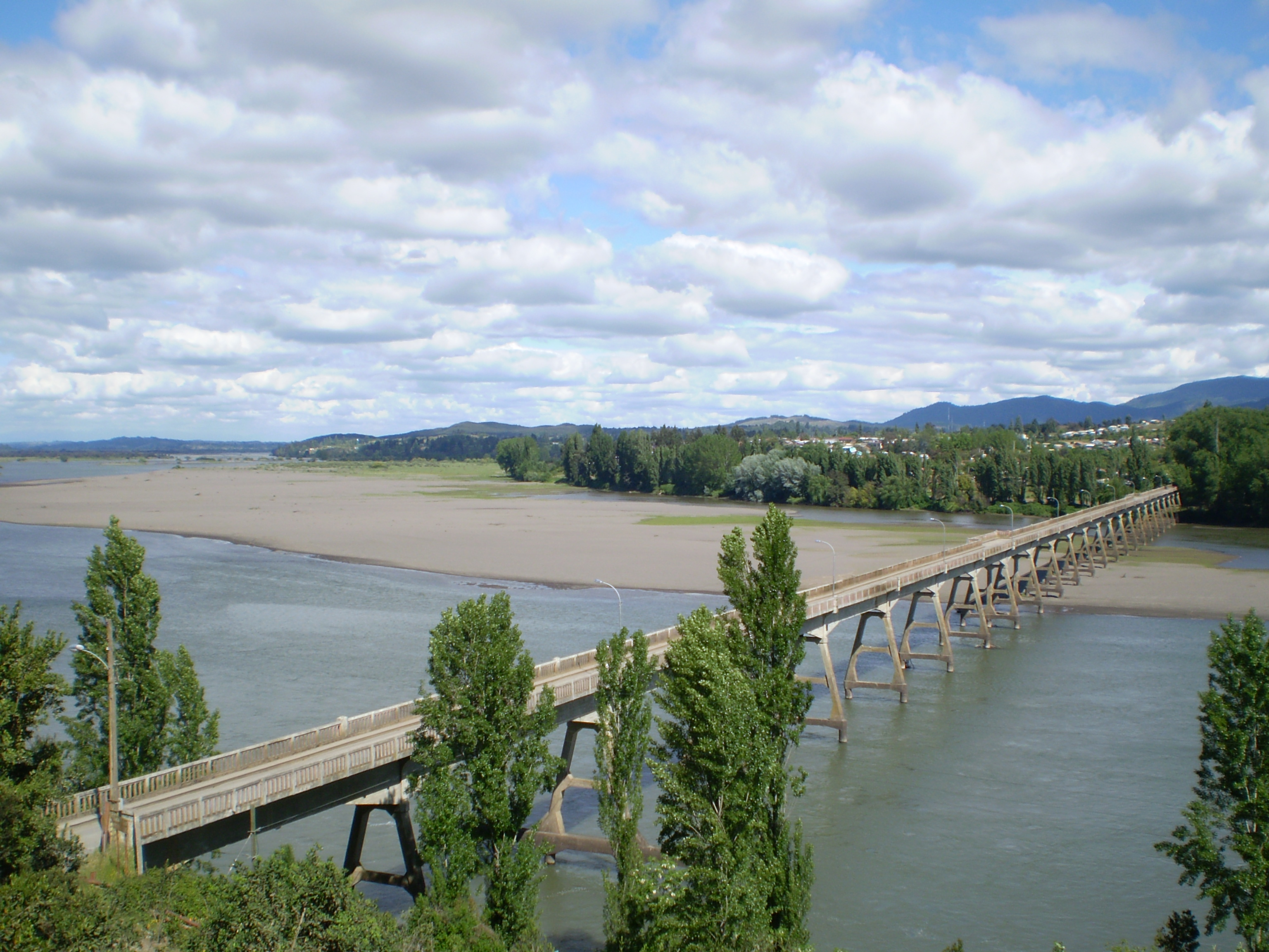 Coelemu es una bella localidad de Chile